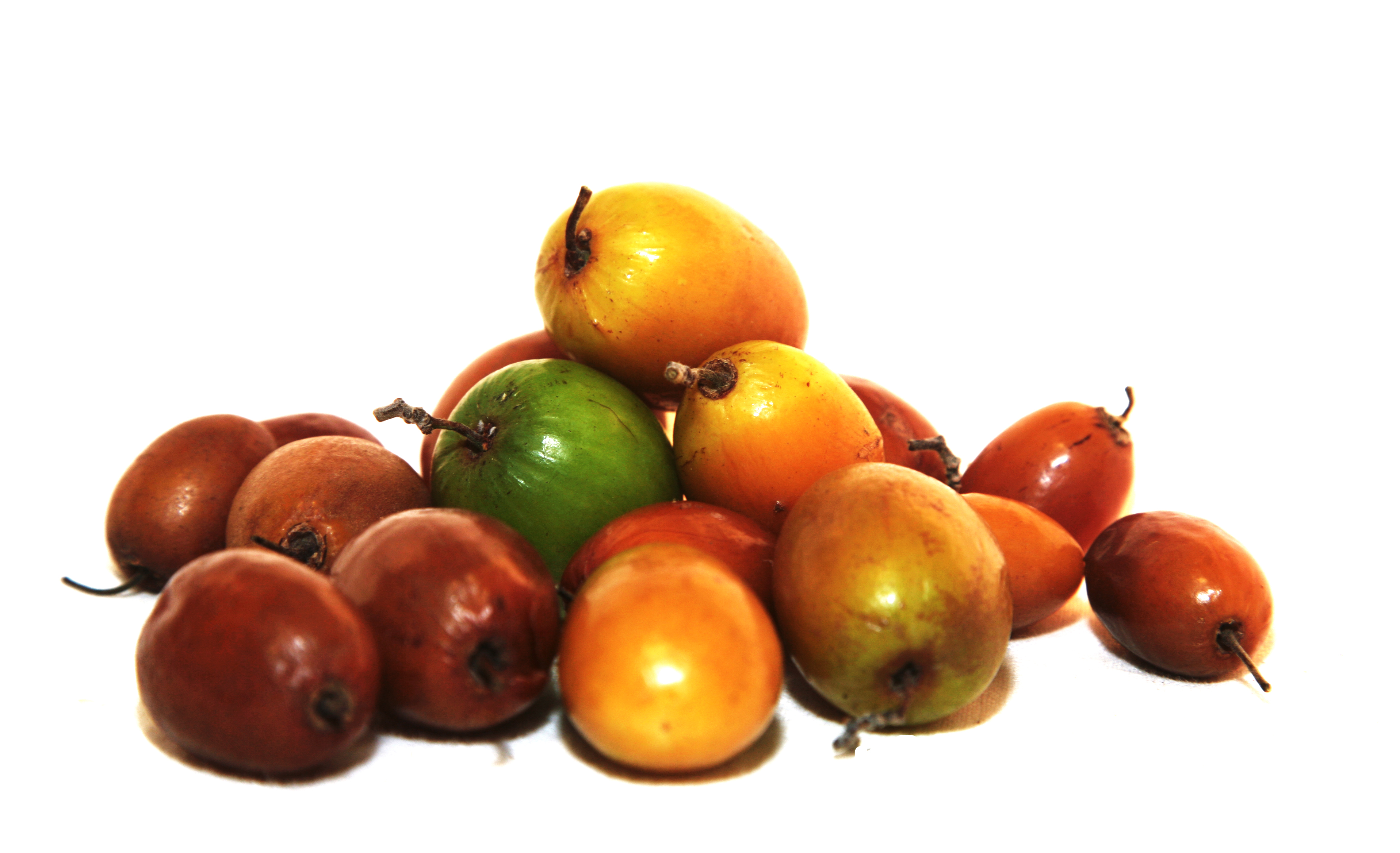 Jujubes, Marché du Chaudron, Saint-Denis de La Réunion